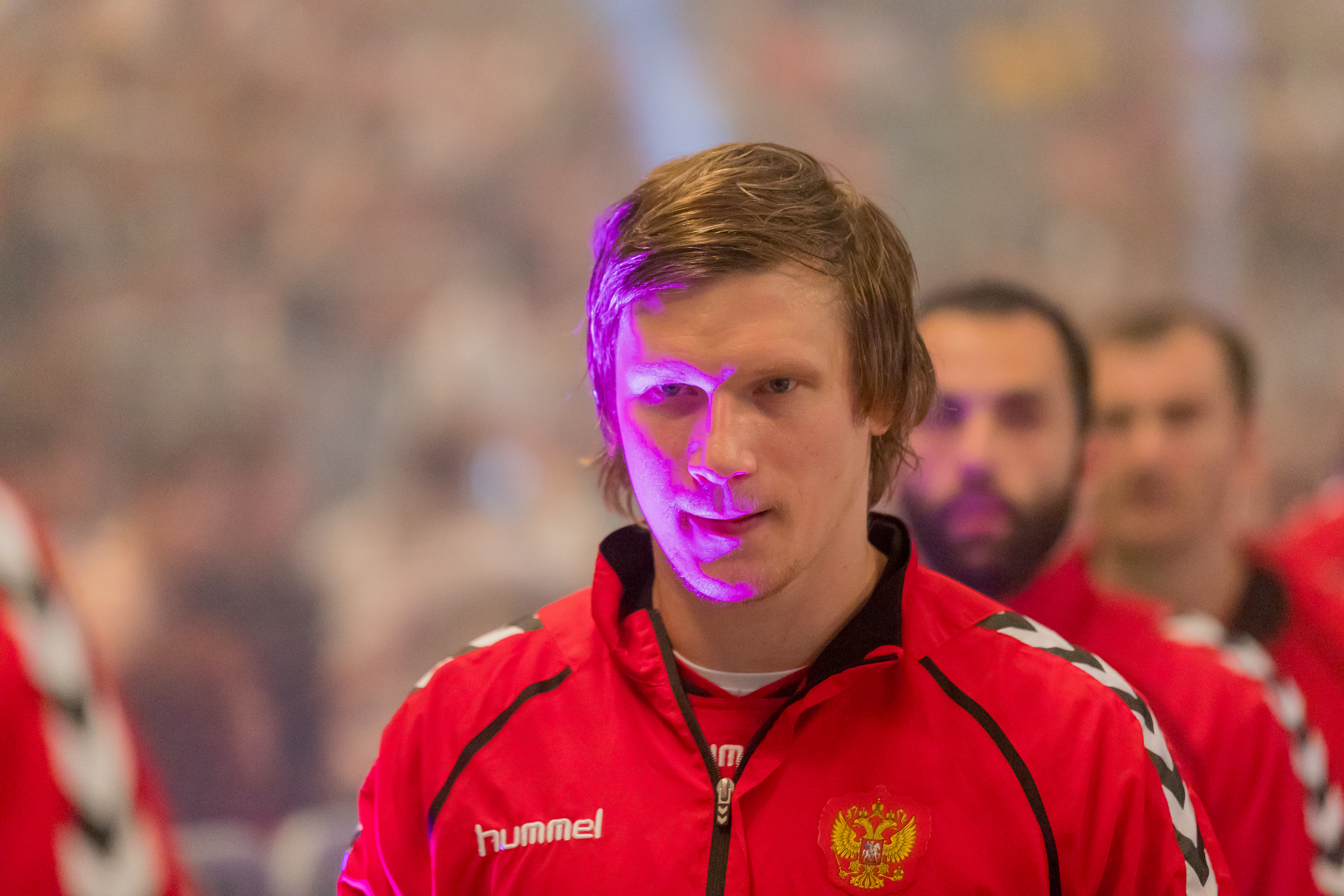 International Handball friendly match between Germany and Russia during Handball Deutschland vs Russland (25:27) at SAP Arena, Mannheim, Baden Württemberg, Germany on 2016-06-08, Photo: Sven Mandel